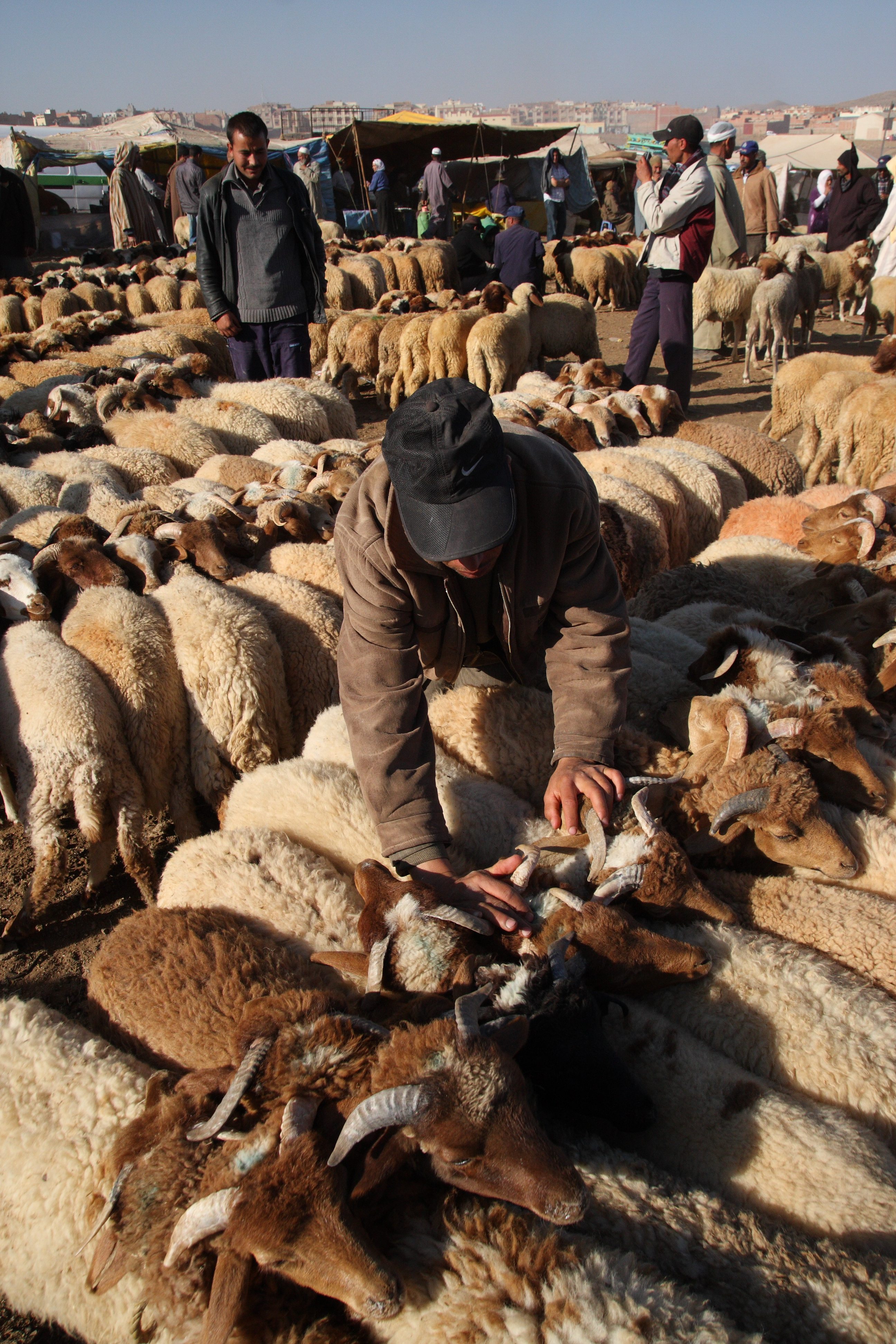 Azrou, Morocco